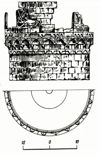 Pirsaat xanəgahının (Pir Hüseyin xanəgahı) minarəsinin şərəfəsi